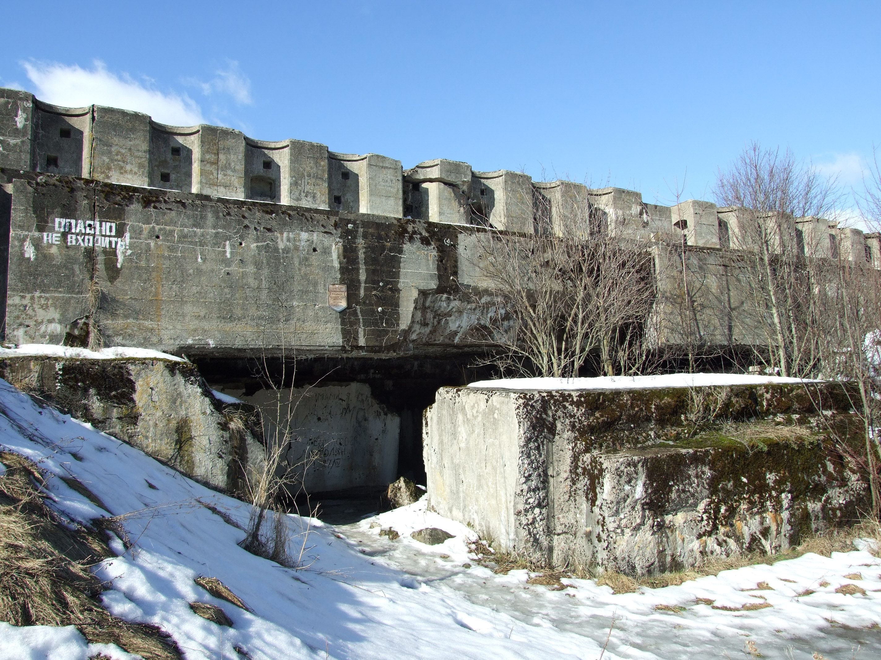 Беларуская (тарашкевіца): Фартыфікацыйныя збудаваньні Гарадзенскай крэпасьці:рэшткі форта № 2 This is a photo of Belarusian heritage monument. Reference number: 412Д000677 ( WLM)